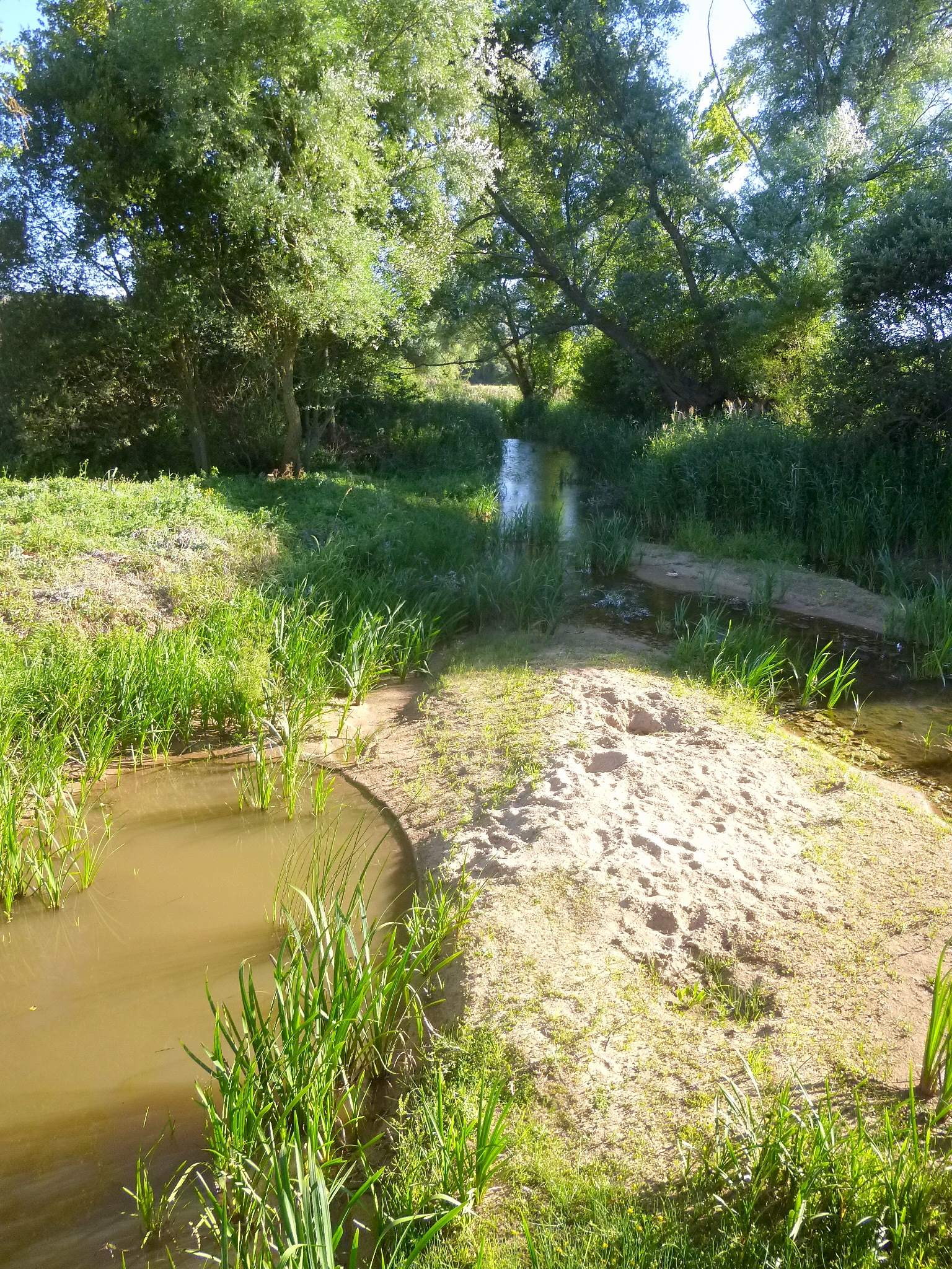 El río Úrbel a su paso por La Piedra (Burgos)